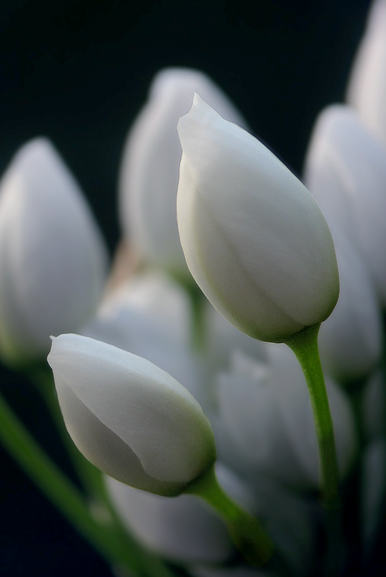 he:שום משולש